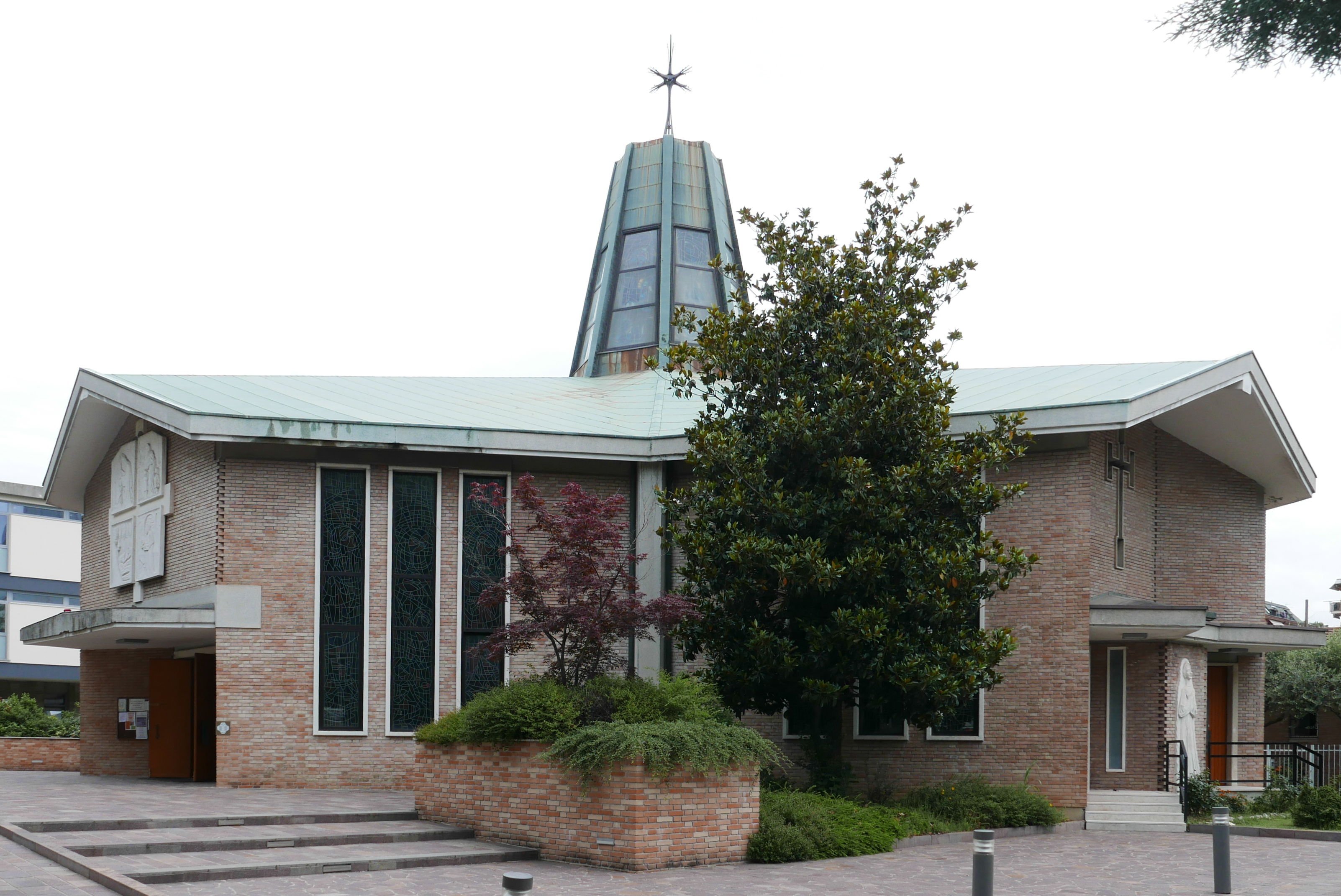 Chiesa parrocchiale di Santa Bertilla Boscardin, a Vicenza